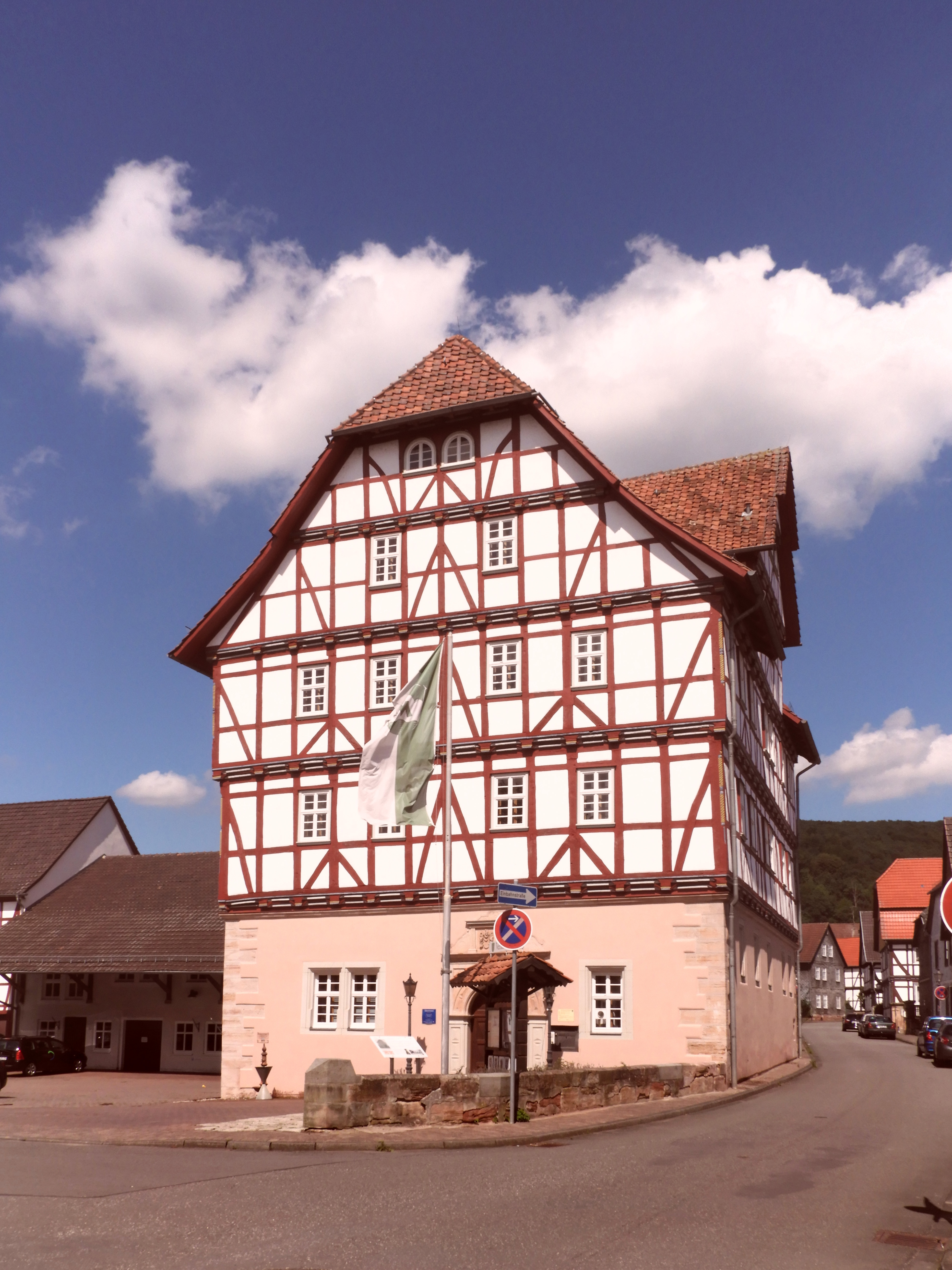 Schloss Grebendorf. Auch Altes Keudellsches Schloss oder Keudellsches Herrenhaus genannt. Wegen seiner künstlerischen, geschichtlichen und städtebaulichen Bedeutung ist das Schloss ein geschütztes Kulturdenkmal.